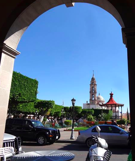 Imagen del centro histórico de Uriangato desde el interior de los portales.